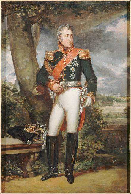 Charles-André, comte Pozzo di Borgo (1764-1832)